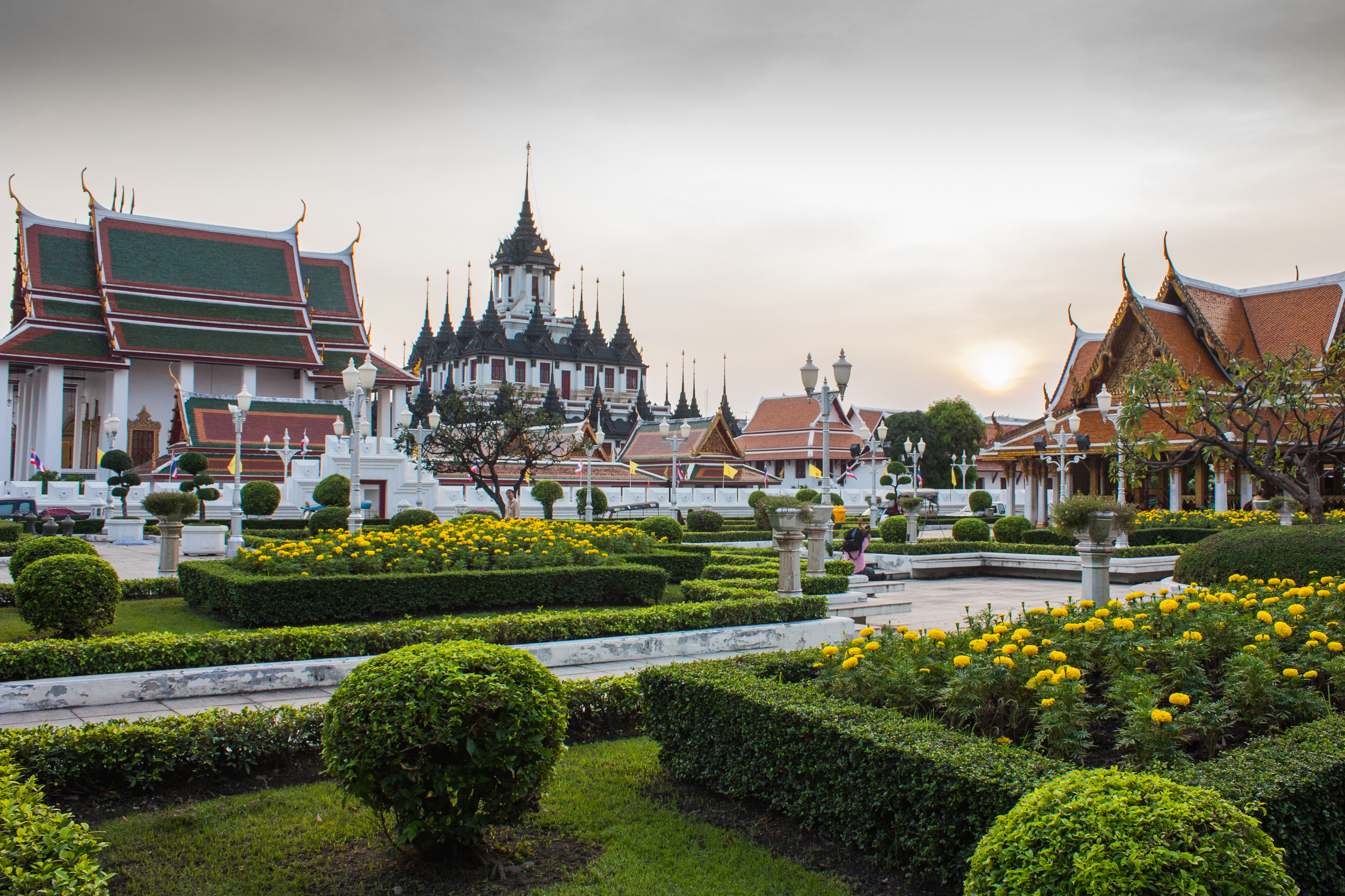 วัดราชนัดดาราม][โลหะปราสาท